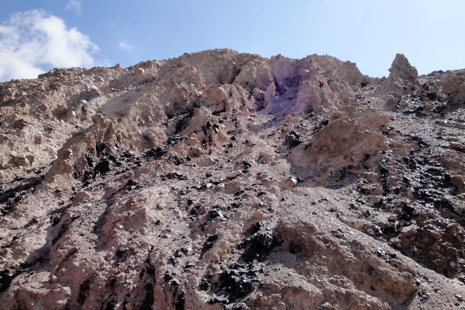 проявление обсидиана Джраберского месторождения